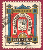 Земская почта Моршанского уезда № 19 (1886) (кат. Чучина)